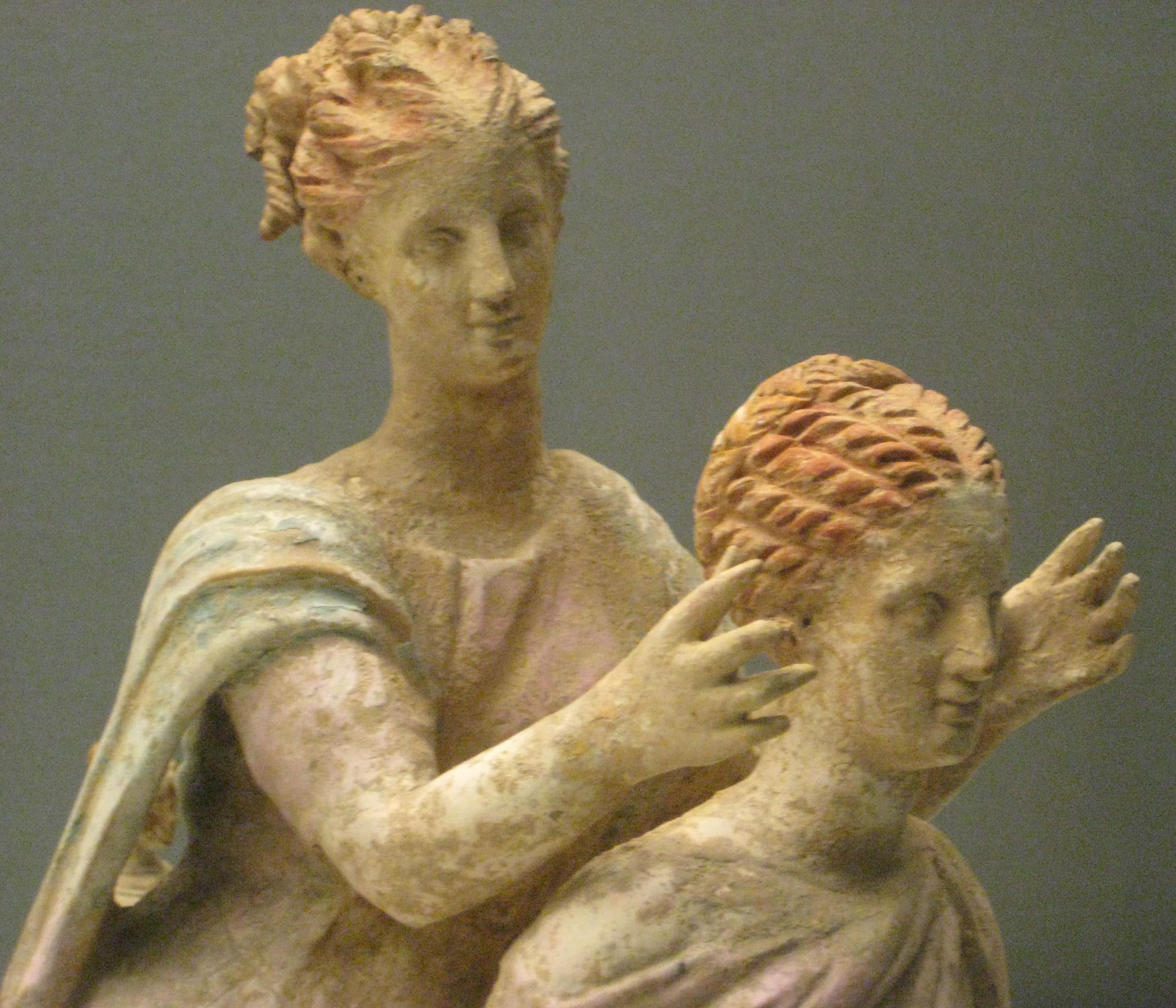 Spelende meisjes. Aardewerk, Korinthe, 300 v. Chr. APM 1891 (vitr. 263) Kinderen speelden allerlei balspelletjes in Griekenland. De verliezer van zo’n balspel moest als ‘ezel’ of ‘paard’ degene die gewonnen had, op de rug dragen (ephedrismos). De berijd(st)er hield de handen voor de ogen van het ‘paard’. Hier haalt het meisje dat op de rug zit zojuist haar handen voor de ogen weg van het rennende meisje. Aardewerk, Korinthe, 300 v. Chr. APM 1891 (vitr. 263) Kinderen speelden allerlei balspelletjes in Griekenland. De verliezer van zo’n balspel moest als ‘ezel’ of ‘paard’ degene die gewonnen had, op de rug dragen (ephedrismos). De berijd(st)er hield de handen voor de ogen van het ‘paard’. Hier haalt het meisje dat op de rug zit zojuist haar handen voor de ogen weg van het rennende meisje. Allard Pierson Museum